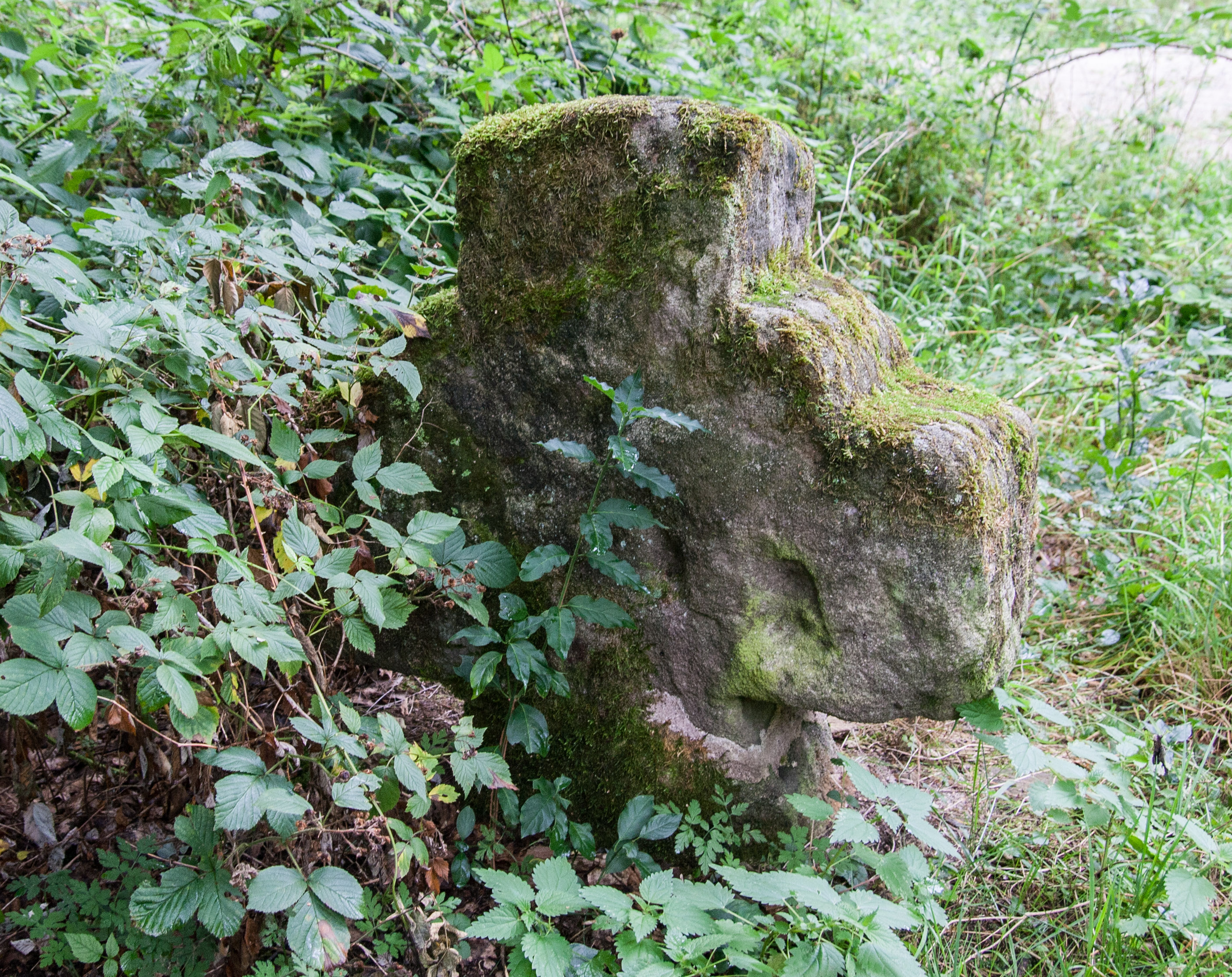 Steinkreuz